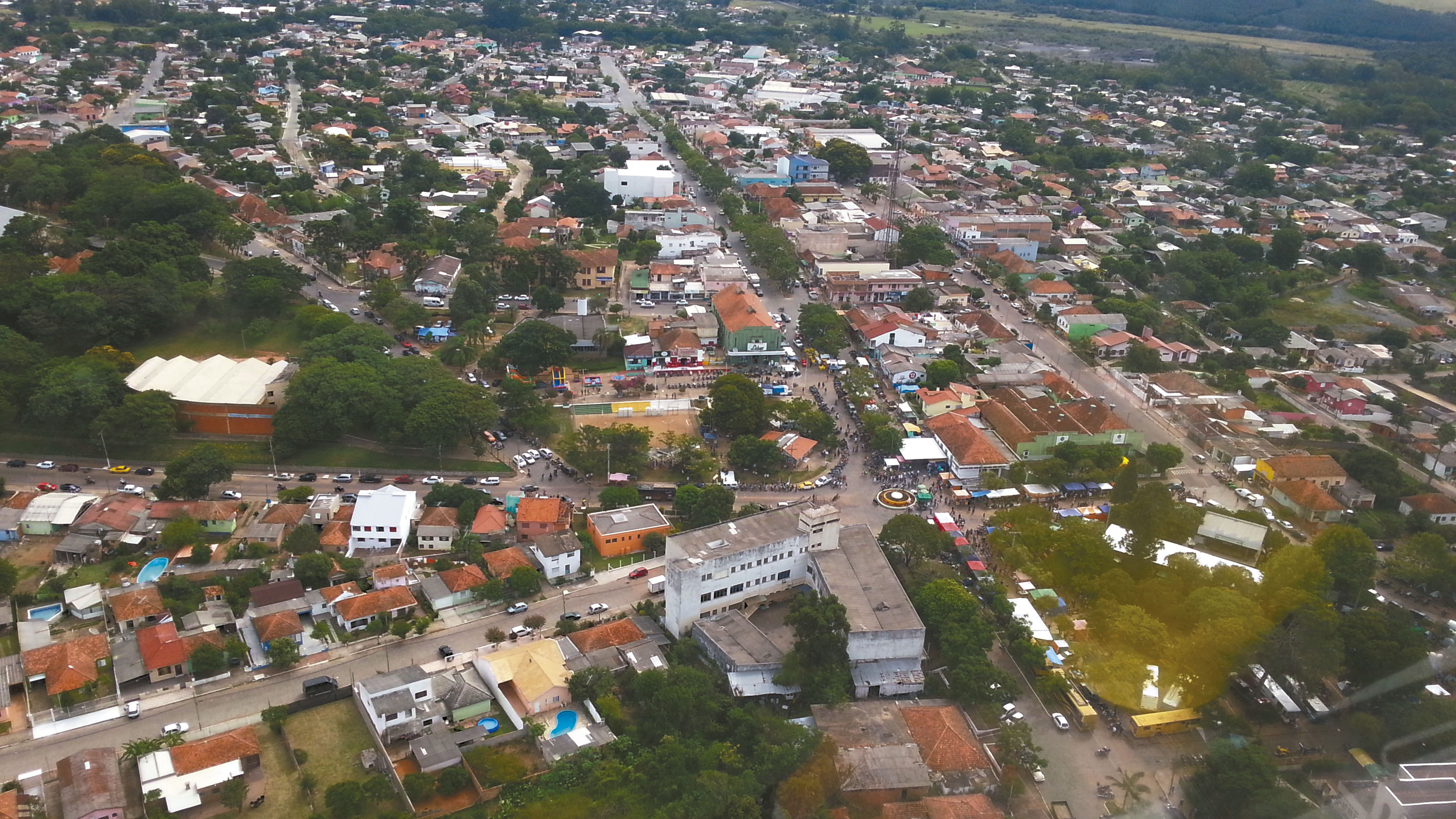 Foto da área central de Butiá em 2014